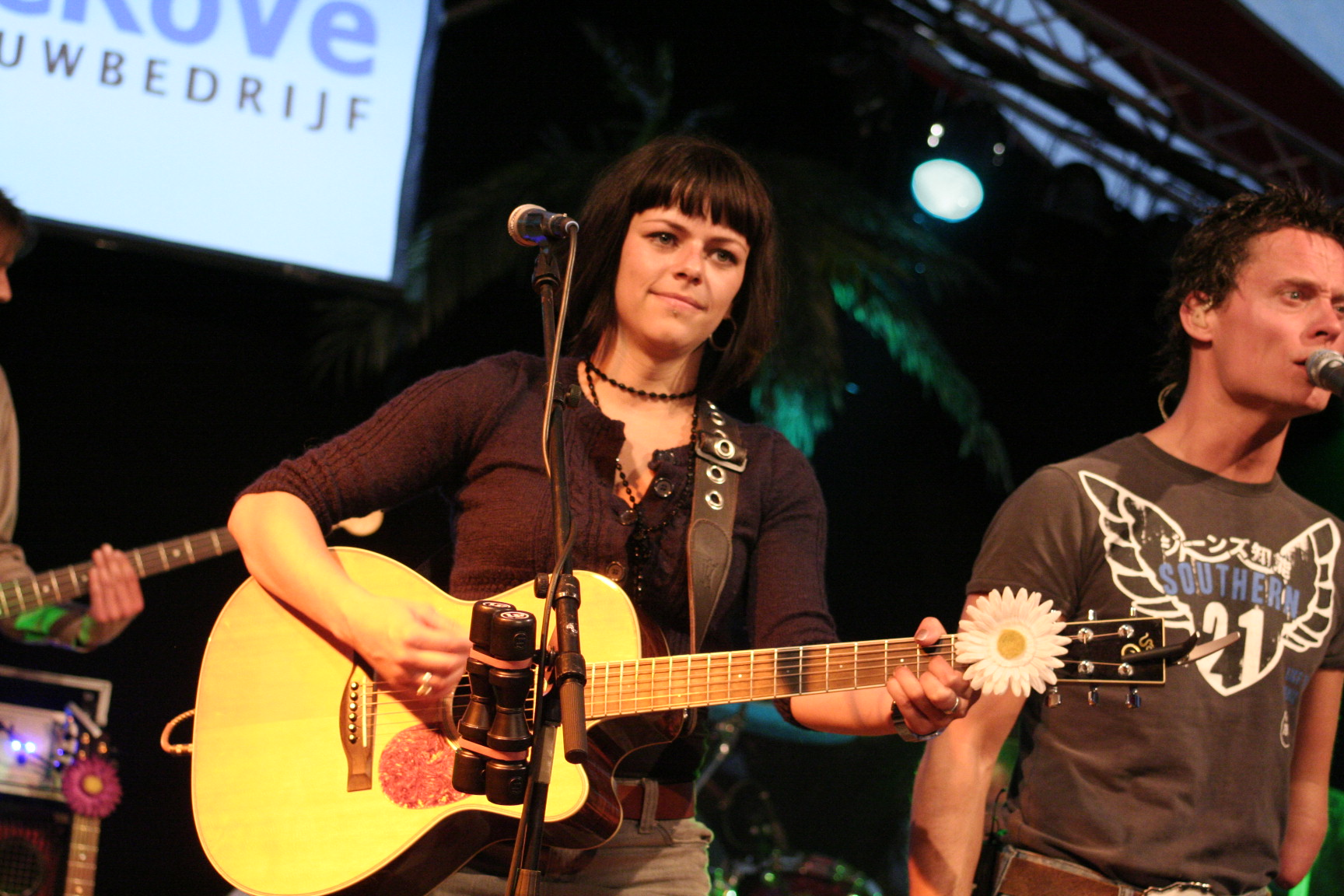 Mirjam Timmer tijdens Motel Westcoast Mirjam Timmer (Leeuwarden, 1 juli 1982) is een Nederlandse singer-songwriter. Ook bekend onder de artiestennaam MIR.